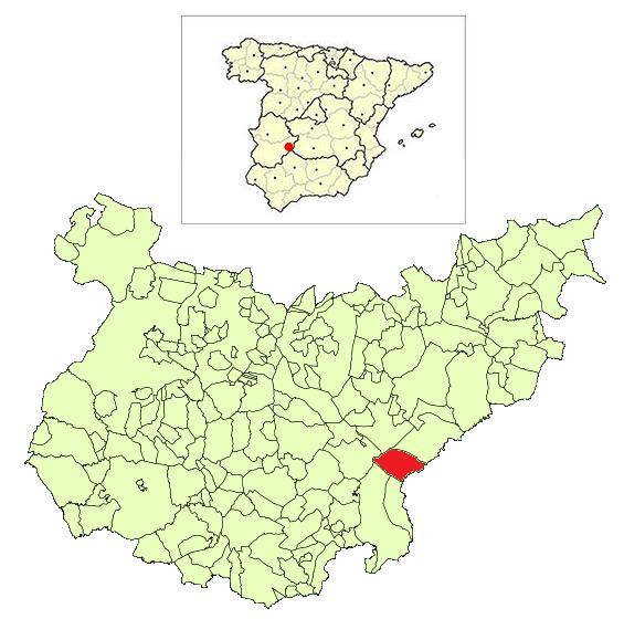 Situación Geográfica del Término Municipal de Peraleda del Zaucejo